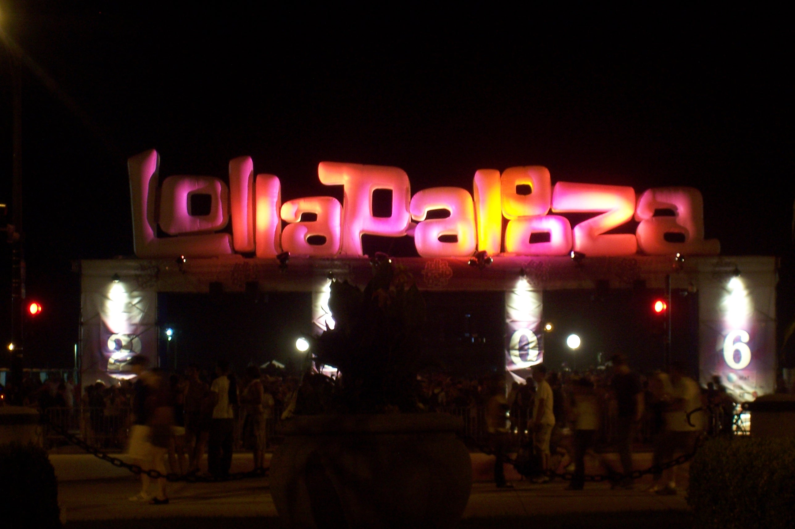 a Lollapalooza sign.